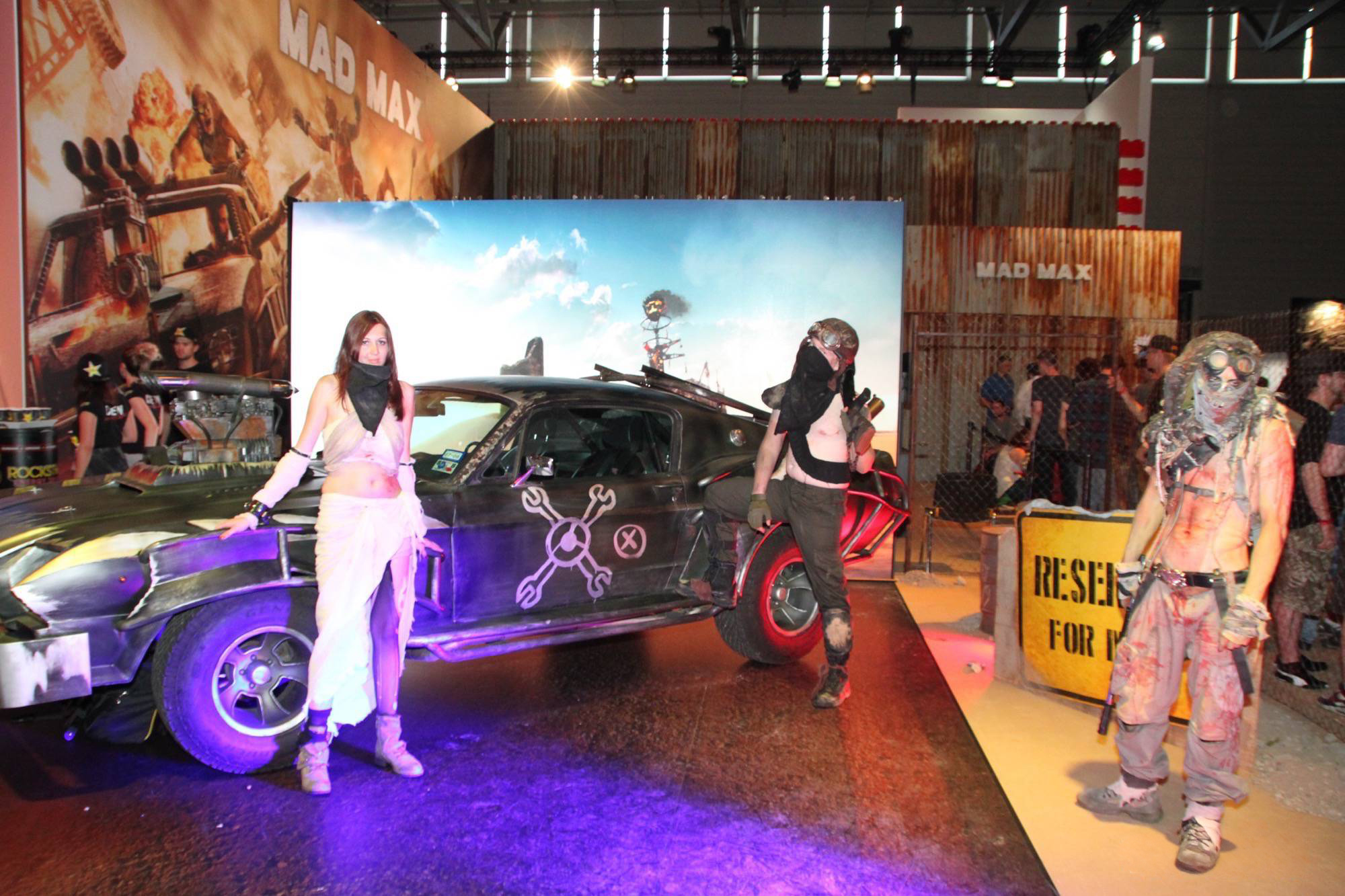 Impressionen: Zweiter Tag, Donnerstag (offen für alle!) Gamescom 2015 impressions